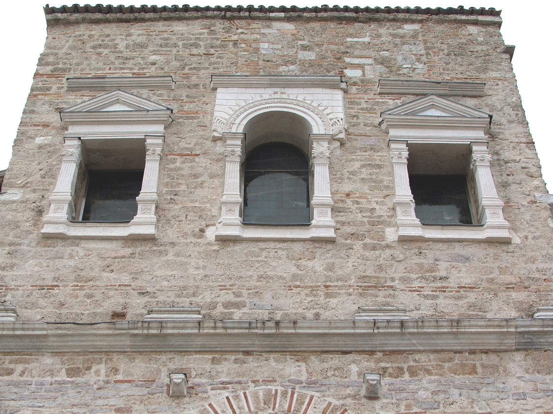 Basilica di San Salvatore (Spoleto) Ldoc